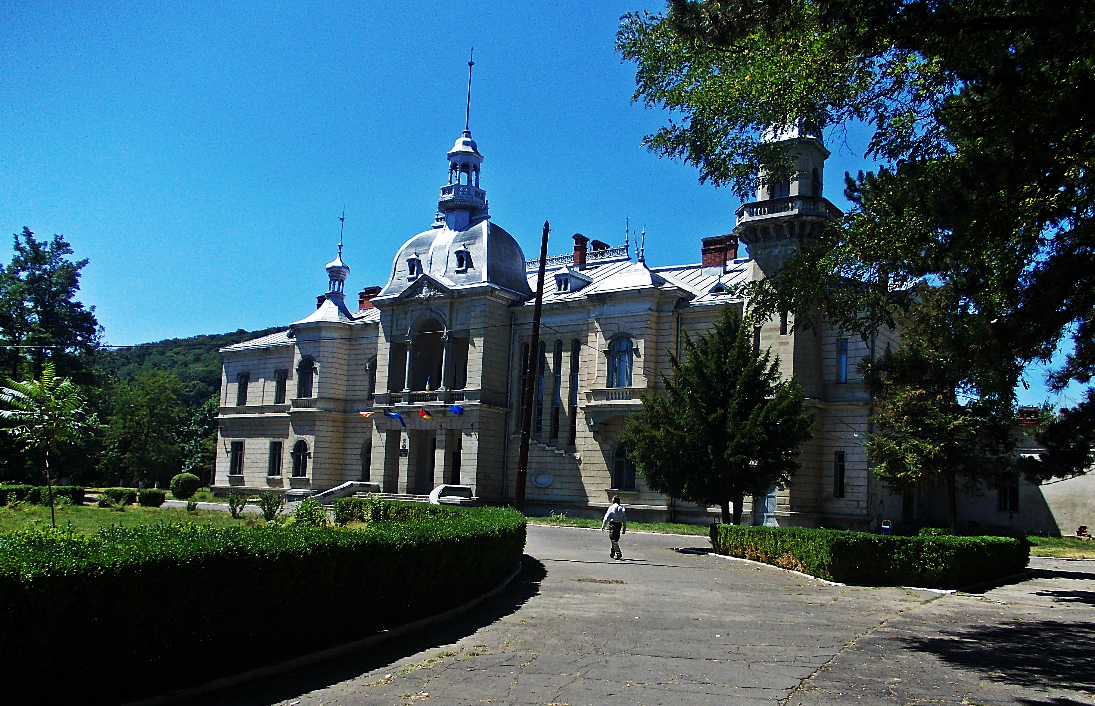 oraș Comănești Str. Republicii 38 01